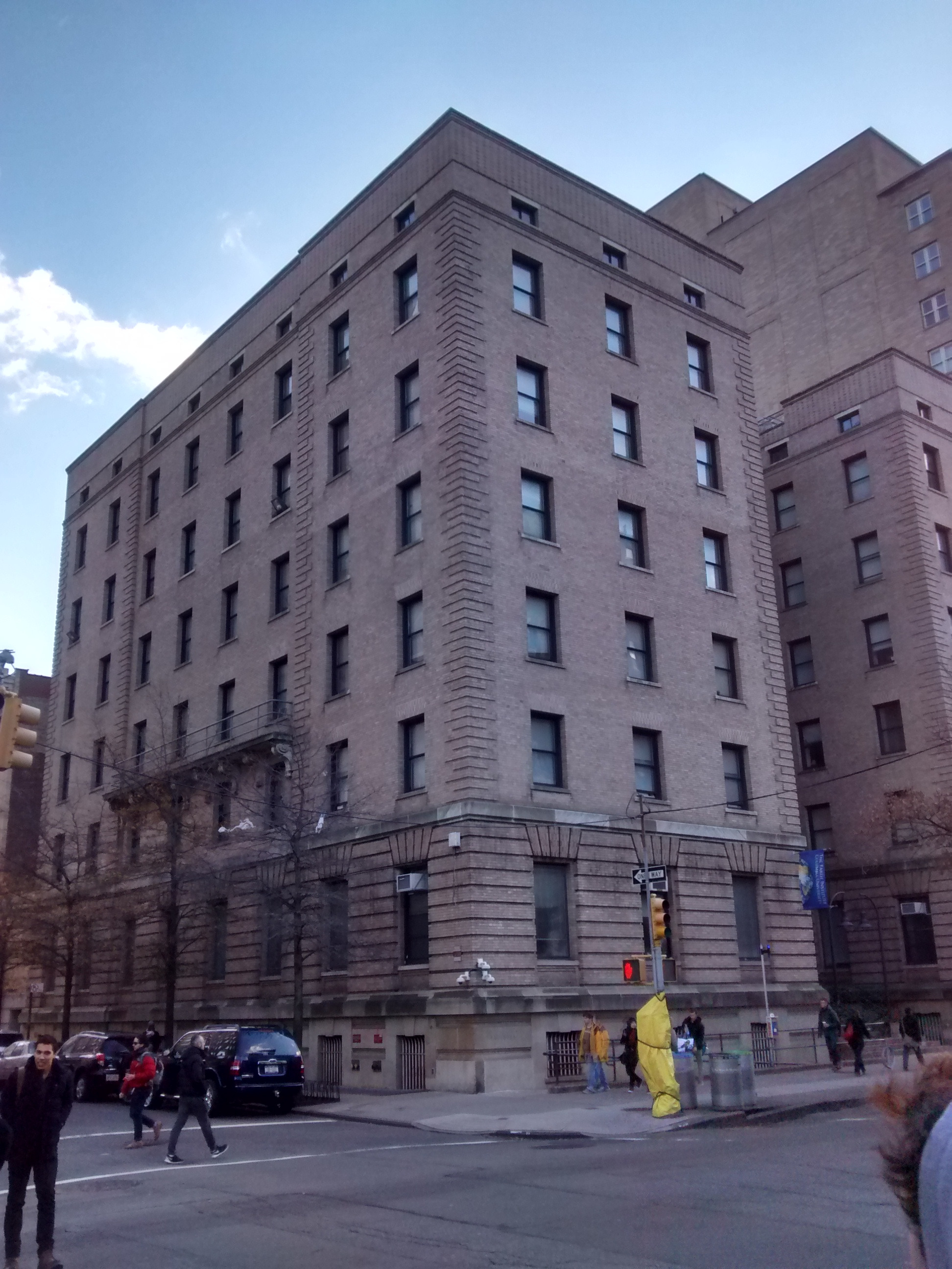 Hogan Hall